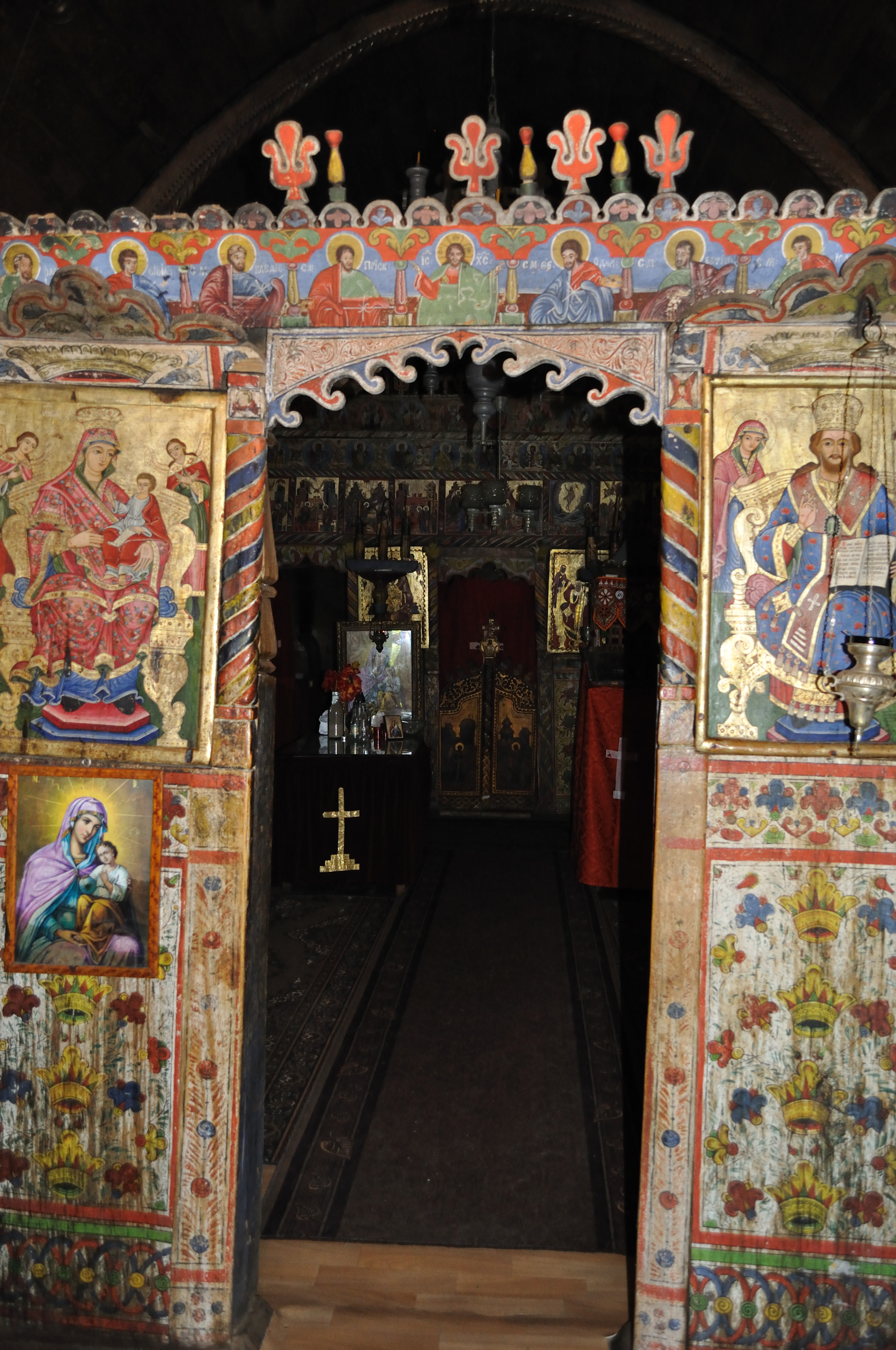 Biserica de lemn din Valea Cucii, județul Argeș